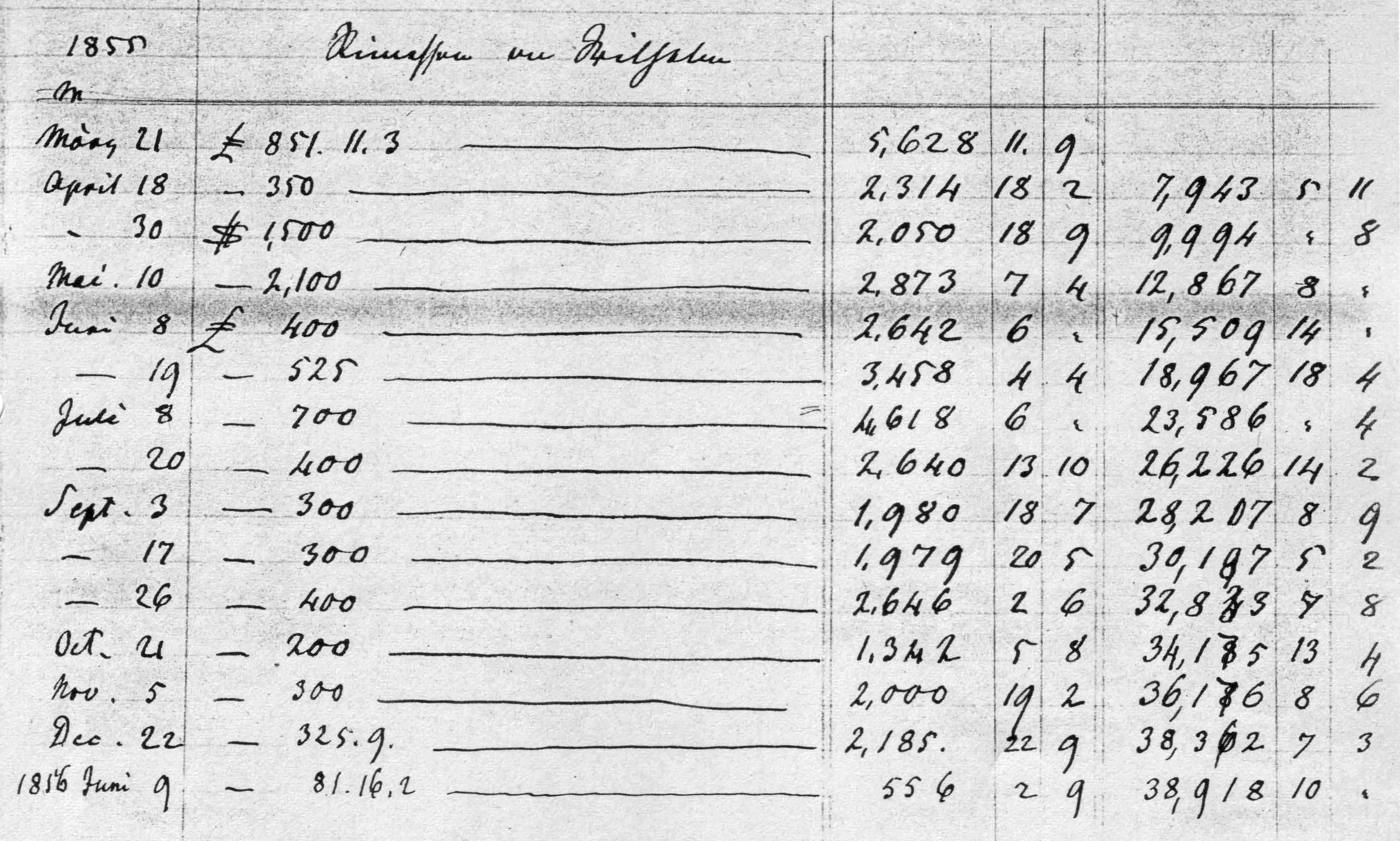 Joseph Gauß: Verzeichnis der Rimessen für Wilhelm Gauß, ohne Ort, 9. Juni 1856.